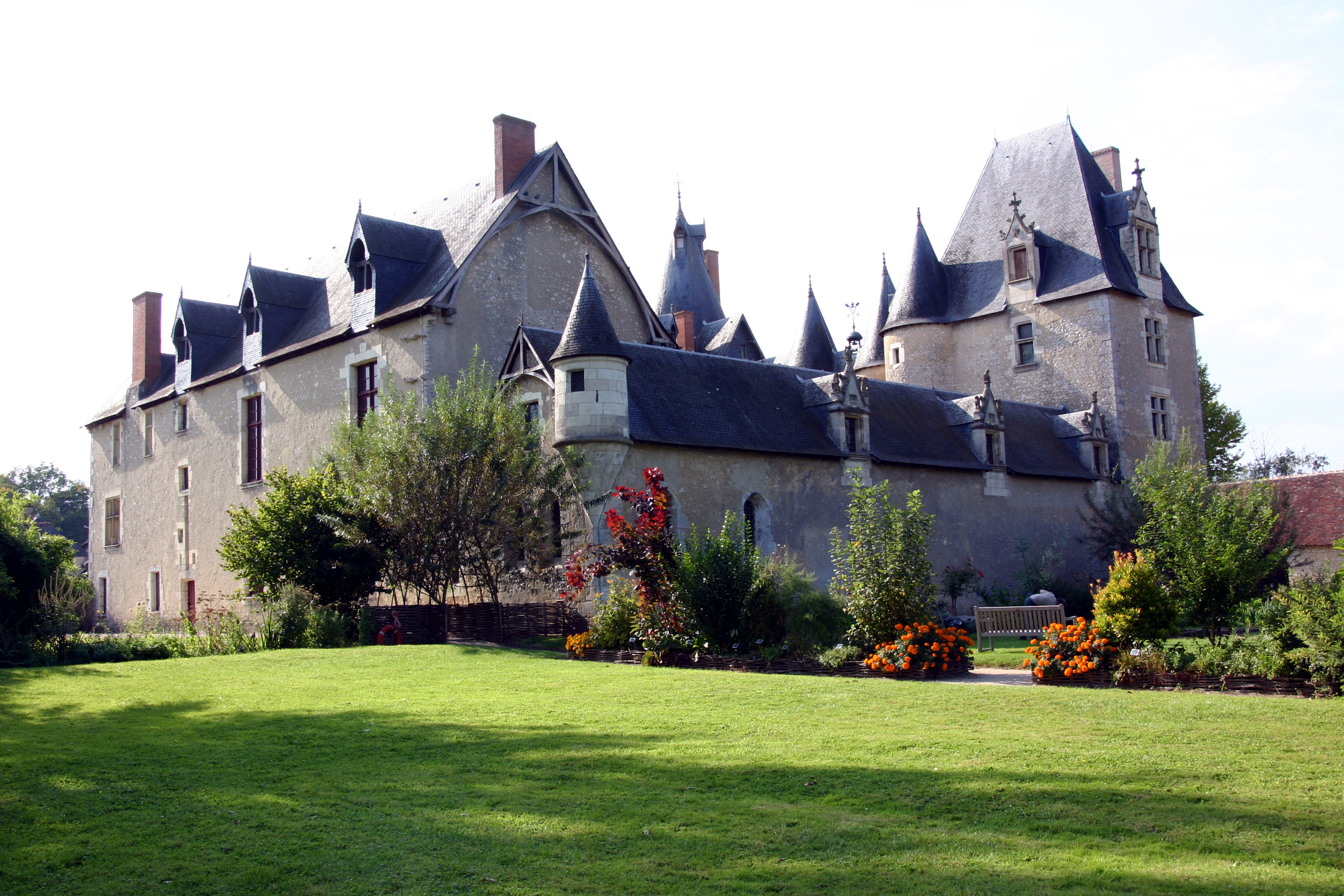 Schloss Fougères-sur-Bièvre